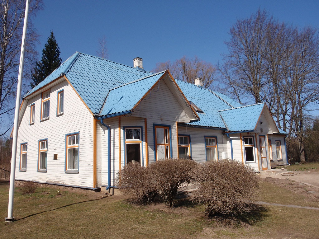 Himmaste algkooli hoone